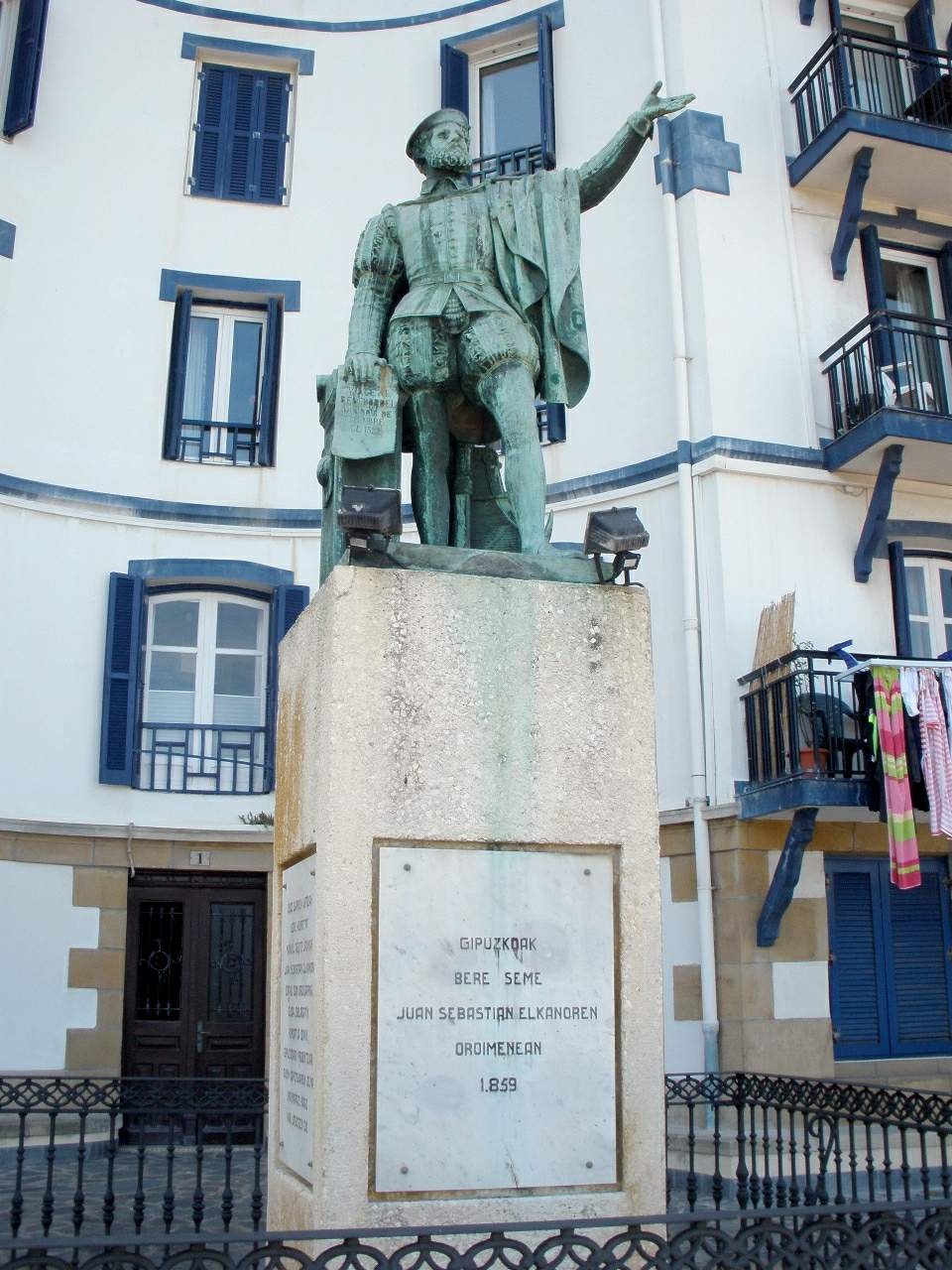 Estatua de Juan Sebastián Elcano, obra de Carlos Palao fechada en 1861, en Getaria